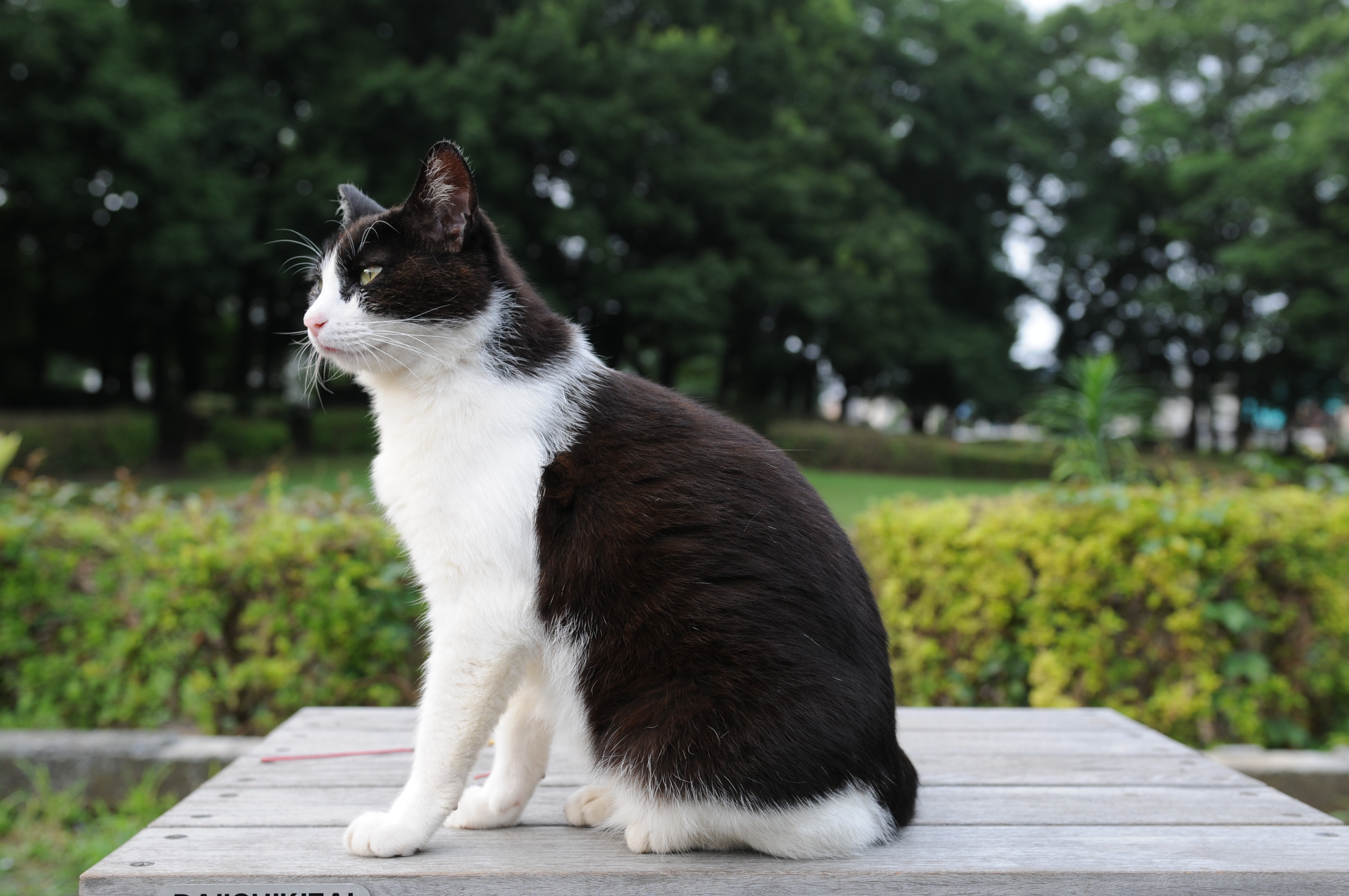 D05_7602